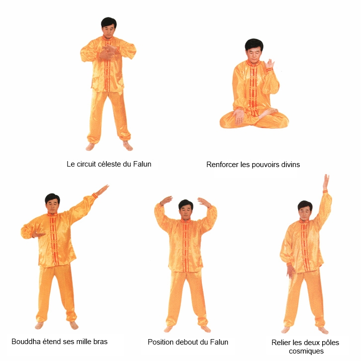 Image montrant les cinq exercices du Falun Gong